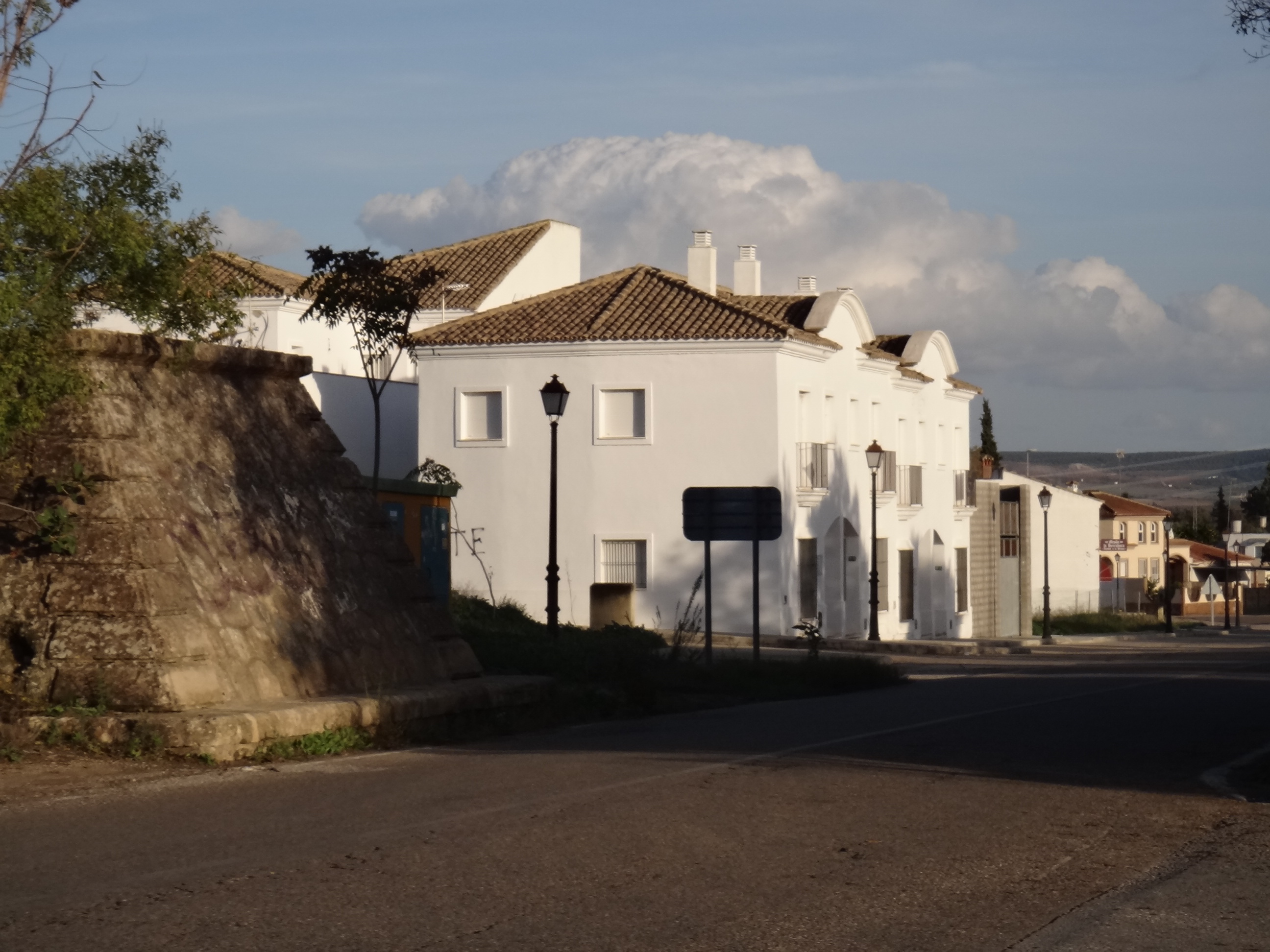 Barriada de la Junta de los Ríos, Arcos de la Frontera (Andalucia, España)